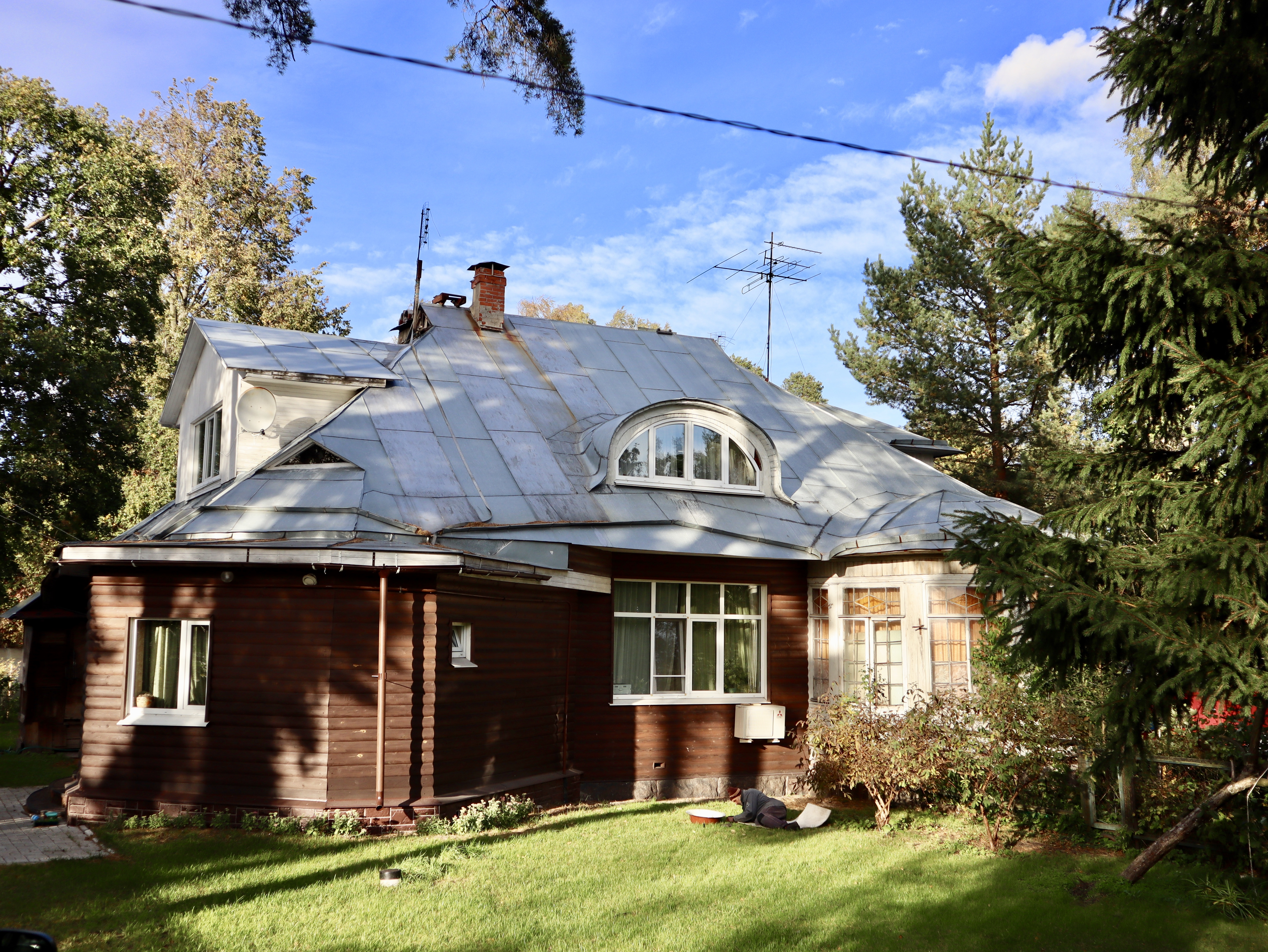 Дача А.П. Вайтенса: Лесная улица, 21, Ольгино, Приморский район, Санкт-Петербург